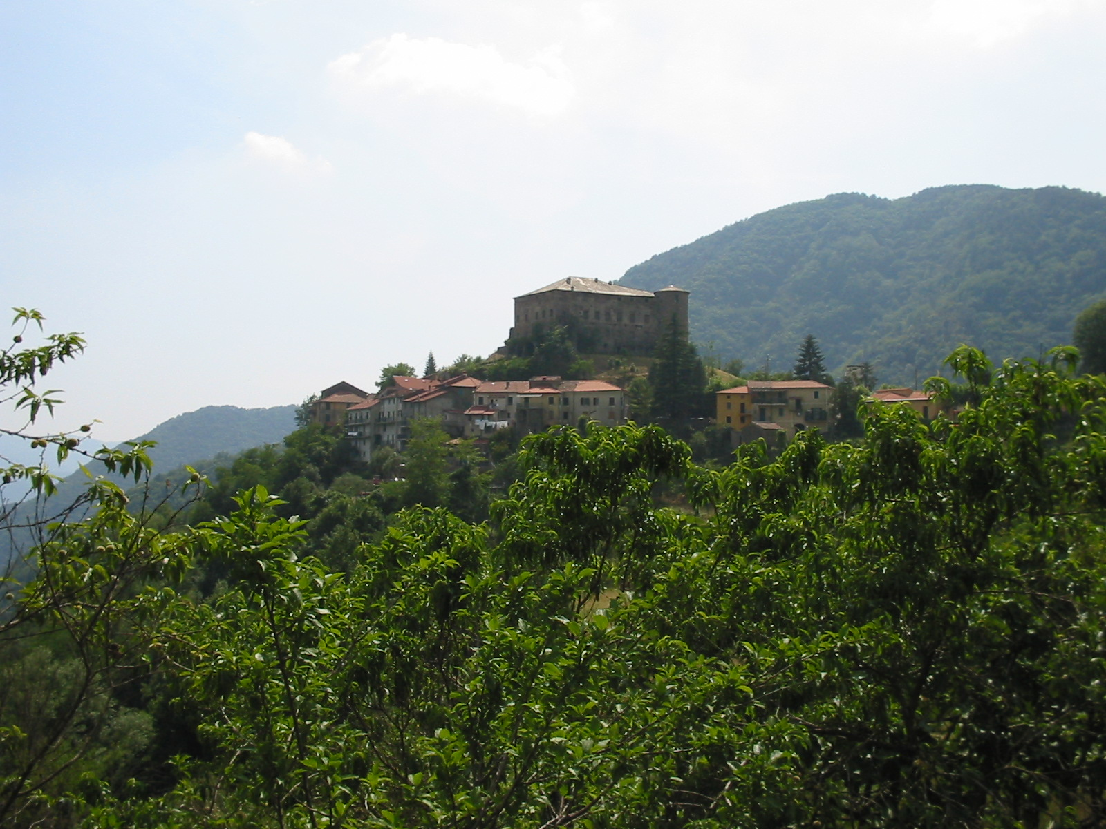 Foto del Castello di Calice. William Domenichini, 3 giugno 2003. ore 15.00 circa --Illy78 13:12, 30 mag 2006 (CEST)